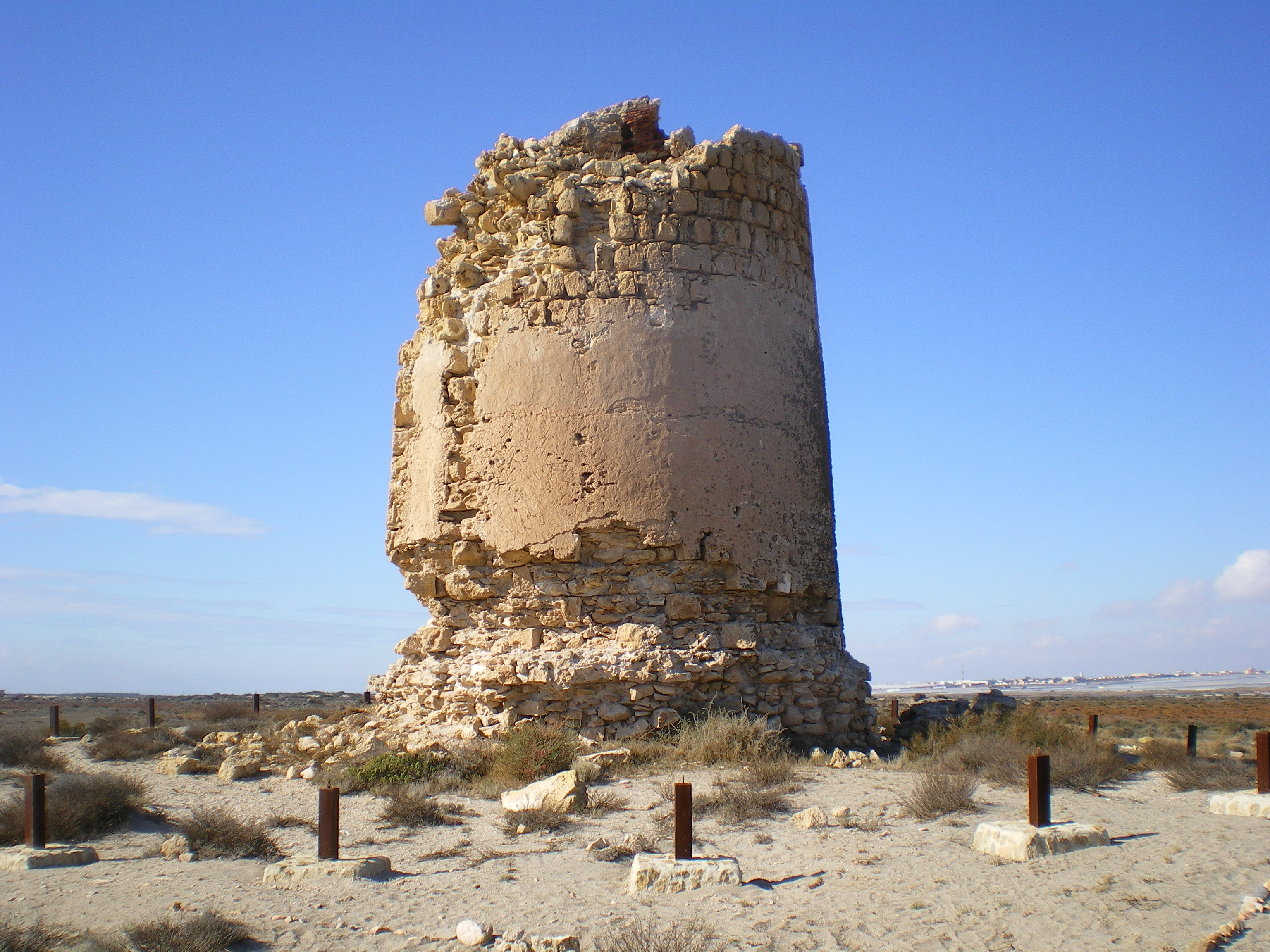 Fotografía de la Torre de Cerrillos, torre costera en el paraje natural de Punta Entinas-Sabinar, municipio de Roquetas de Mar, provincia de Almería, Andalucía, España.